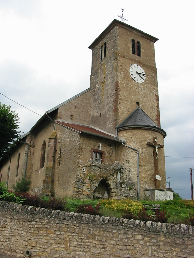 Église Saint-Martin à Flin (Meurthe-et-Moselle)